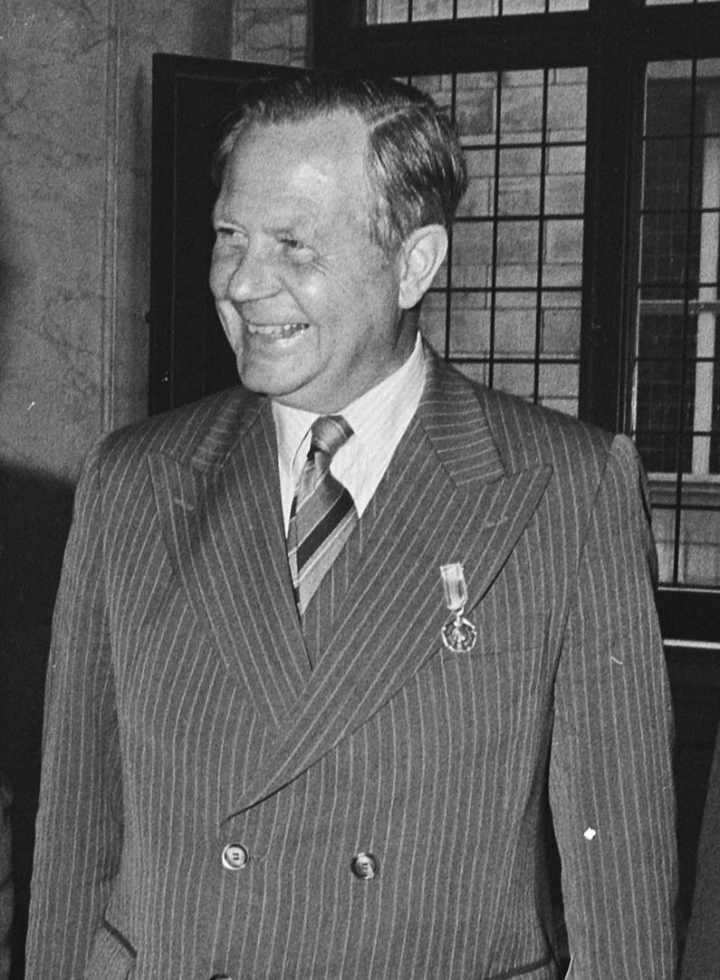 Collectie / Archief : Fotocollectie Anefo Reportage / Serie : [ onbekend ] Beschrijving : Zilveren Anjers uitgereikt door Prins Bernhard inPaleis op de Dam in Amsterdam; de Prins met 3 laureaten v Dubbe (uit Deventer), Bernhard Datum : 26 juni 1981 Locatie : Amsterdam, Noord-Holland Trefwoorden : paleizen, prinsen, uitreikingen Persoonsnaam : Bernhard, prins Instellingsnaam : Zilveren Anjer Fotograaf : Antonisse, Marcel / Anefo Auteursrechthebbende : Nationaal Archief Materiaalsoort : Negatief (zwart/wit) Nummer archiefinventaris : bekijk toegang 2.24.01.05 Bestanddeelnummer : 931-5663 Reacties Geplaatst door Maaike op 06 november 2012 - 20:01. Persoonsnamen: B. Dubbe; Prins Bernhard; H. van Beuningen; G. Schampers Instellingsnamen: Prins Bernhard Fonds (thans Prins Bernhard Cultuurfonds) locatie: Koninklijk Paleis